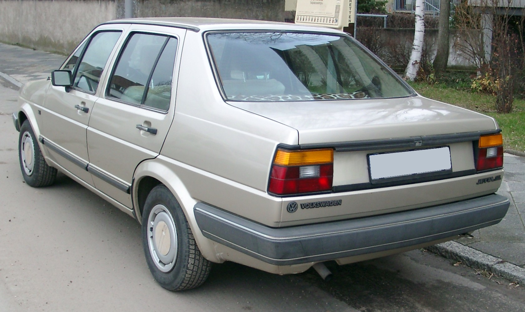 VW Jetta